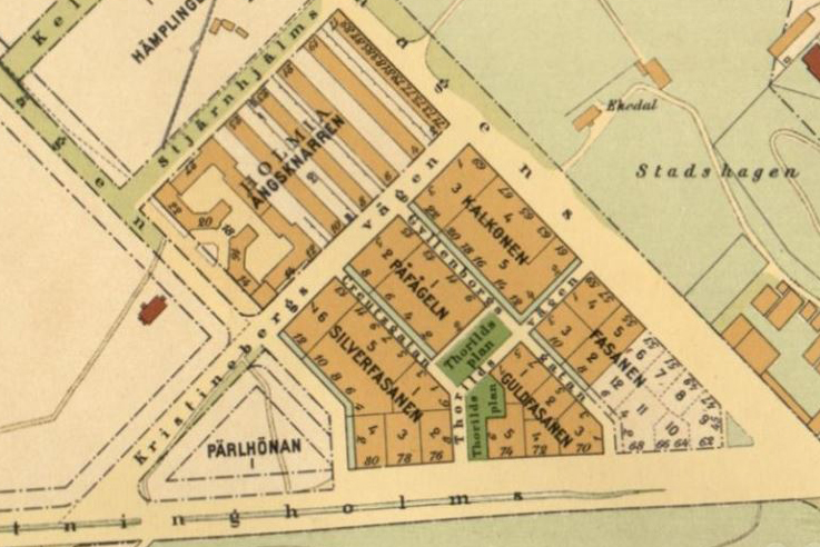 Kvarteret Ängsknarren, bostadsområdet Holmia 1930